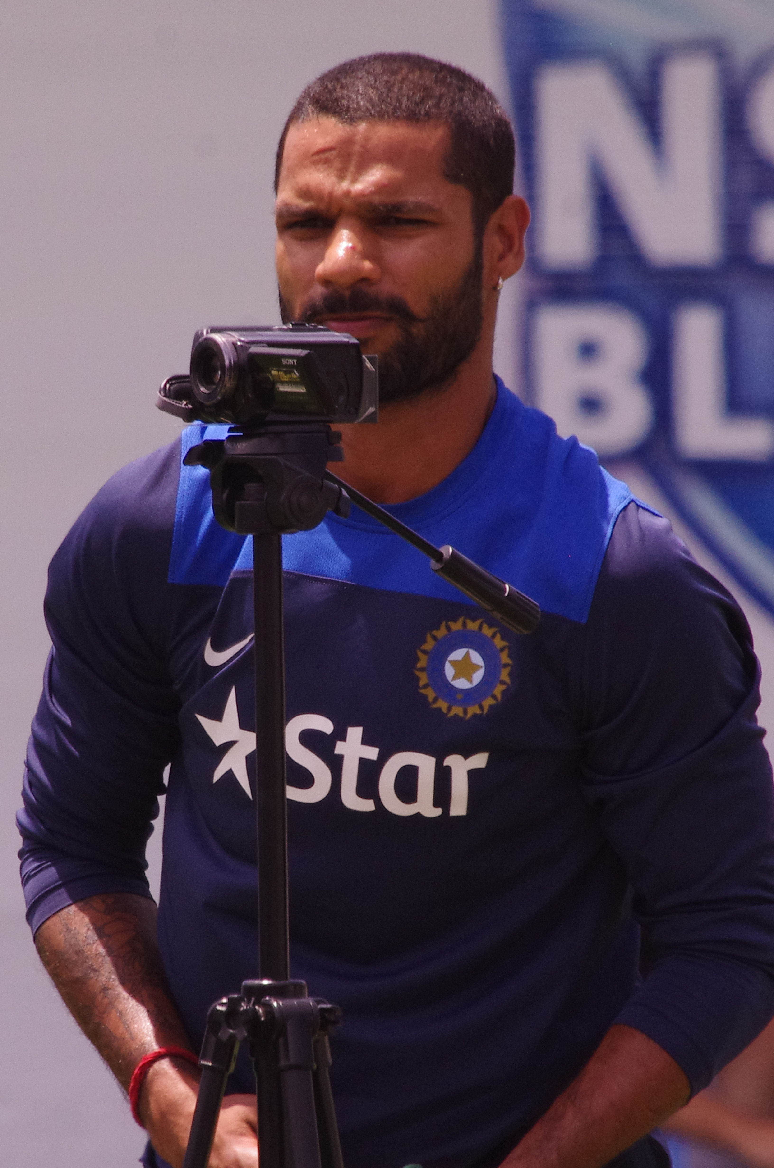 SHIKHAR DHAWAN